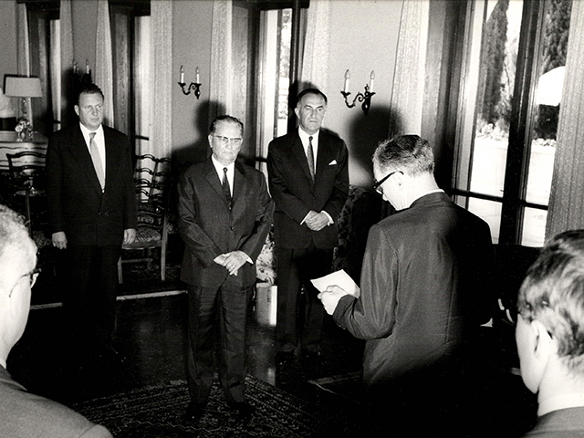 Srpski (latinica): Predsednik Tito prima akreditive od ambasadora SR Nemačke Petera Blahštajna, Brioni 06.06.1968. Inventarski broj:1968 375 004